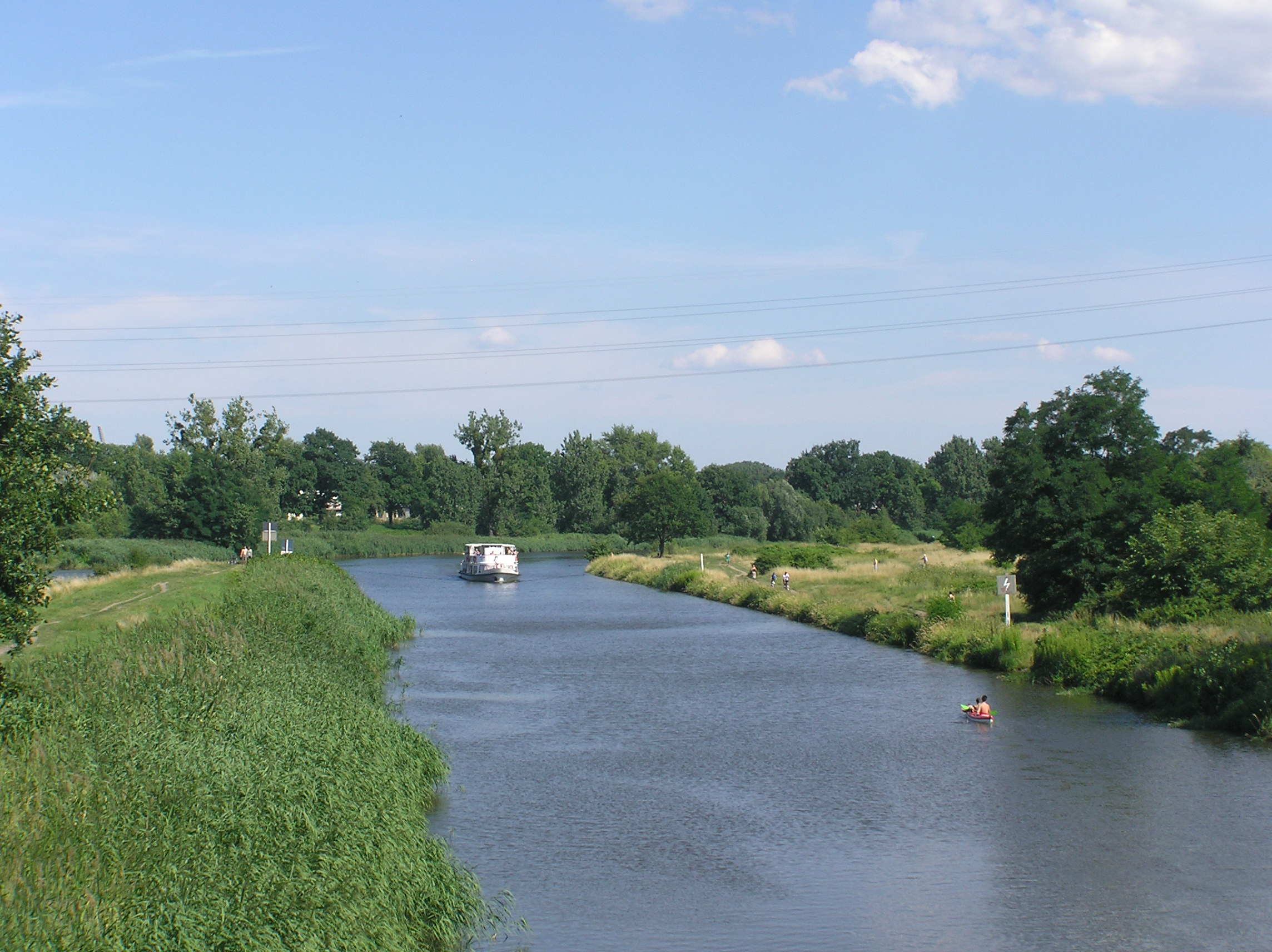 Wrocław, Odra, początek Kanału Miejskiego (bifurkacja - Stara Odra)